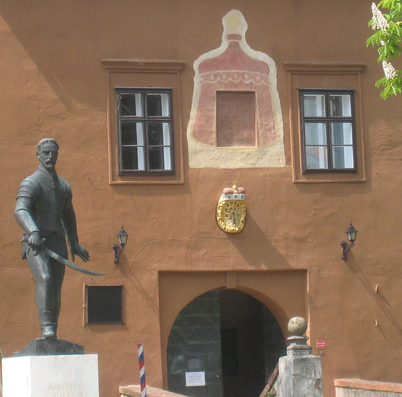 Kiseg, Jurišićev kip in grb rodbine Esterházy pred vhodom v notranji del gradu.